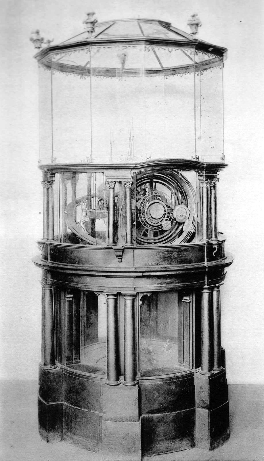 Planetarium vom Jahr 1759; Johann Georg Neßtfell